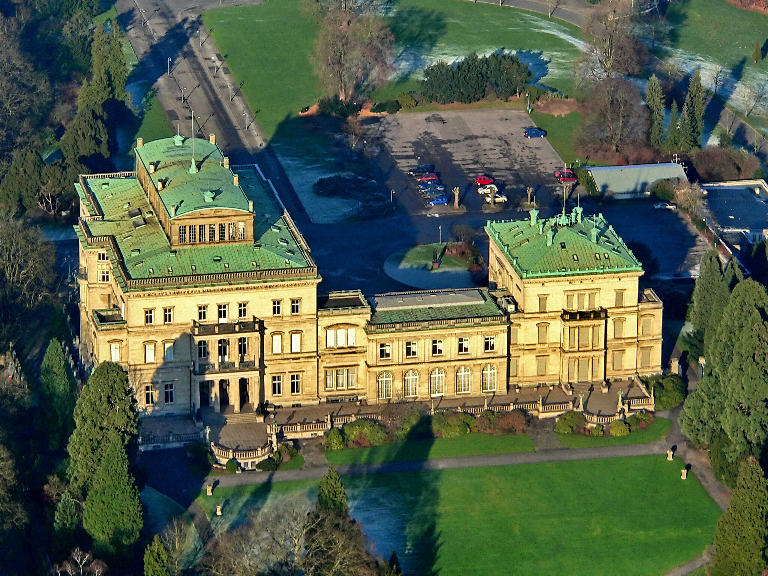 Luftbild der Villa Hügel, das ehemalige Wohnhaus der Krupp-Familie in Essen, Südseite